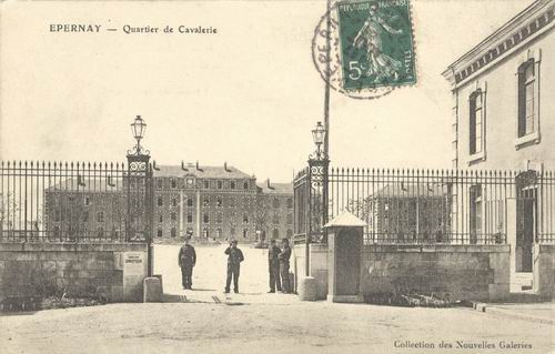 Quartiers du 9e regiment de dragons à Epernay en 1914. Le nom de tradition de ce régiment est Bauffremont Dragons.